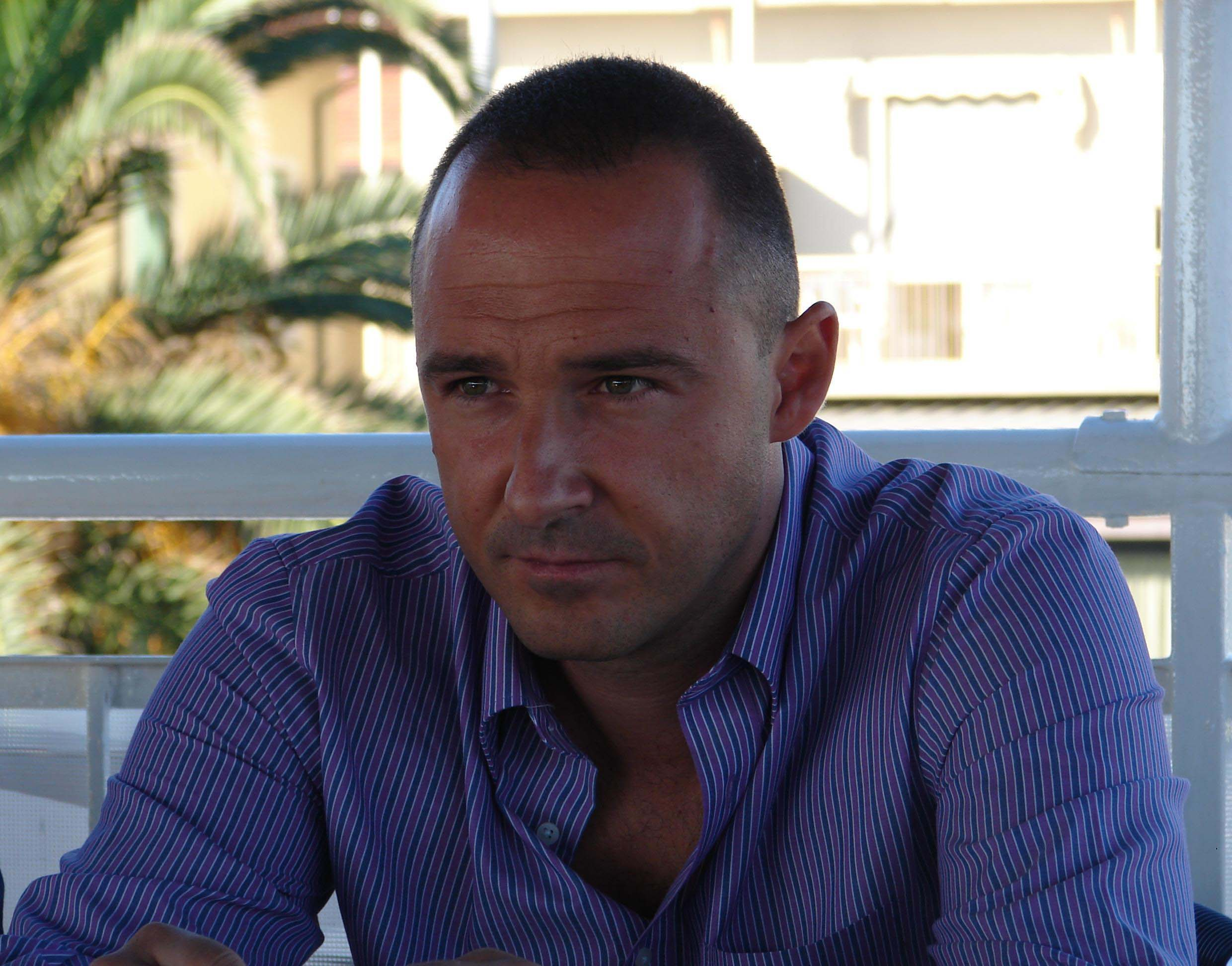 Divier Nelli.